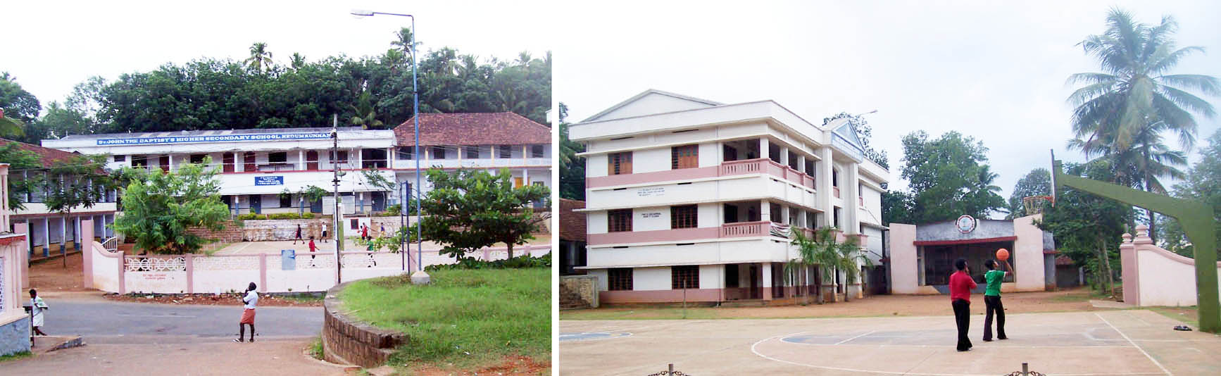 സെൻറ് ജോൺ ദ ബാപ്റ്റിസ്റ്റ് ഹയർ സെക്കൻഡറി സ്കൂൾ നെടുംകുന്നം